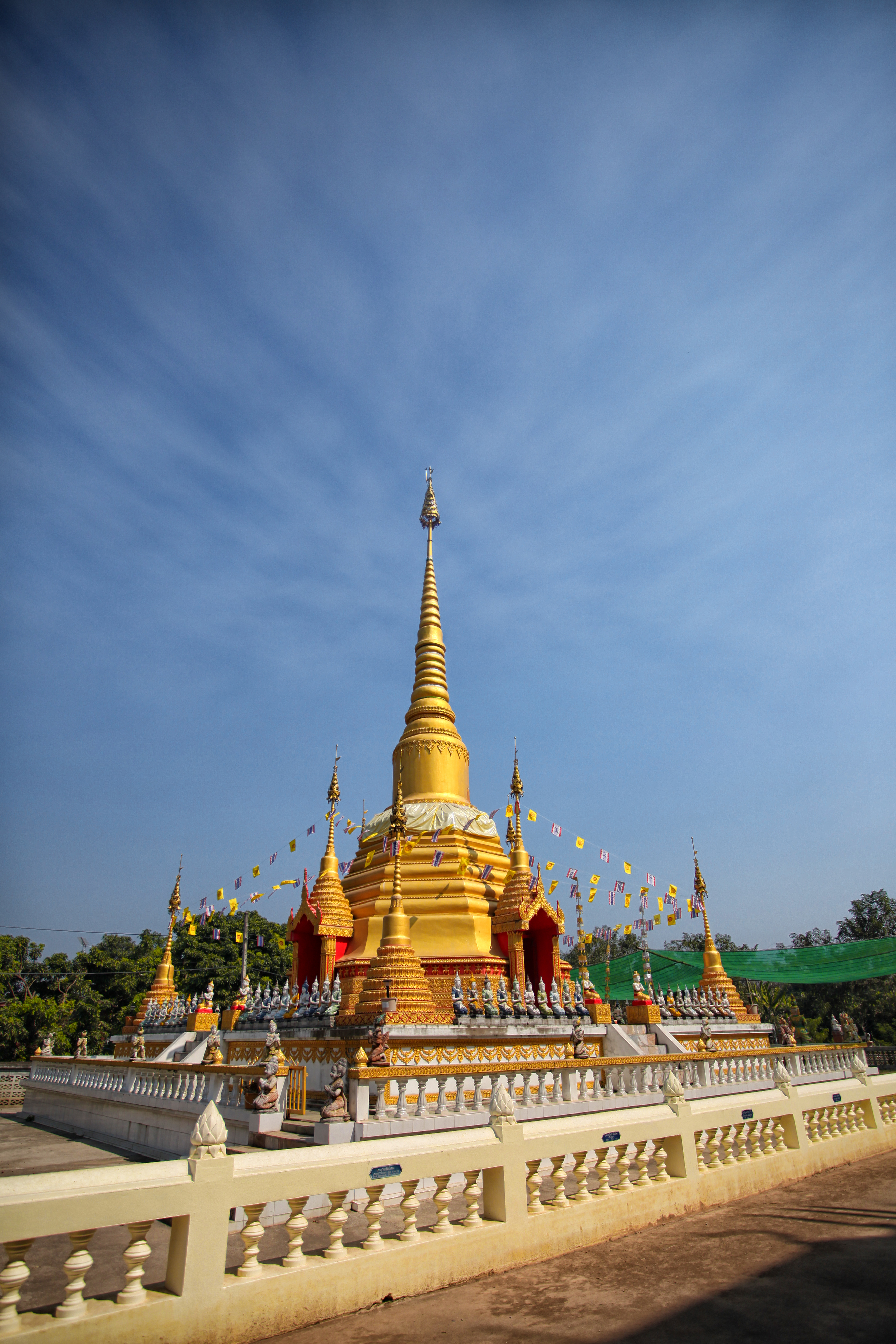 เจดีย์วังใคร้ (วัดวังไคร้)